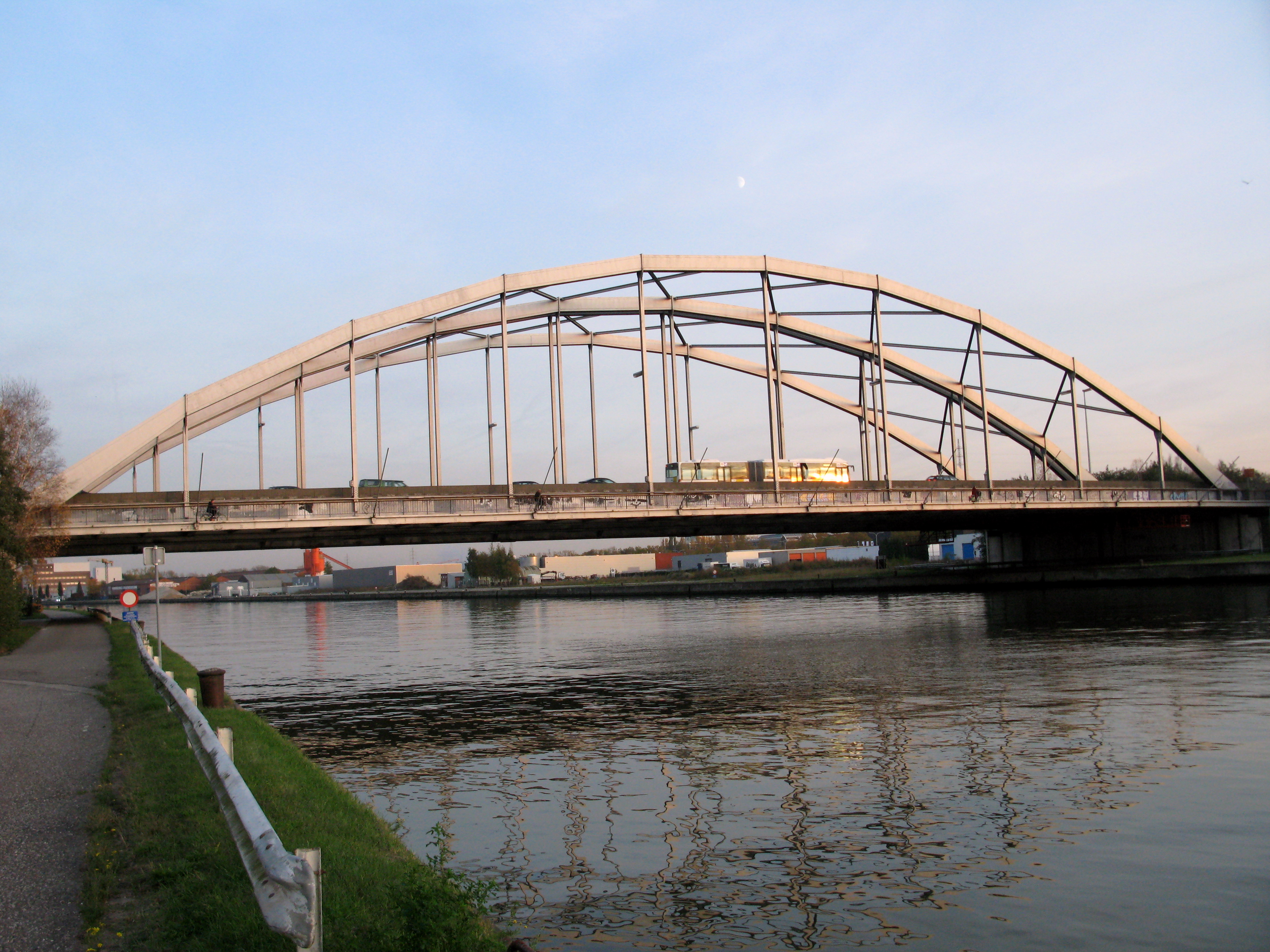 Brécke vun Hasselt iwwer den Albertkanal